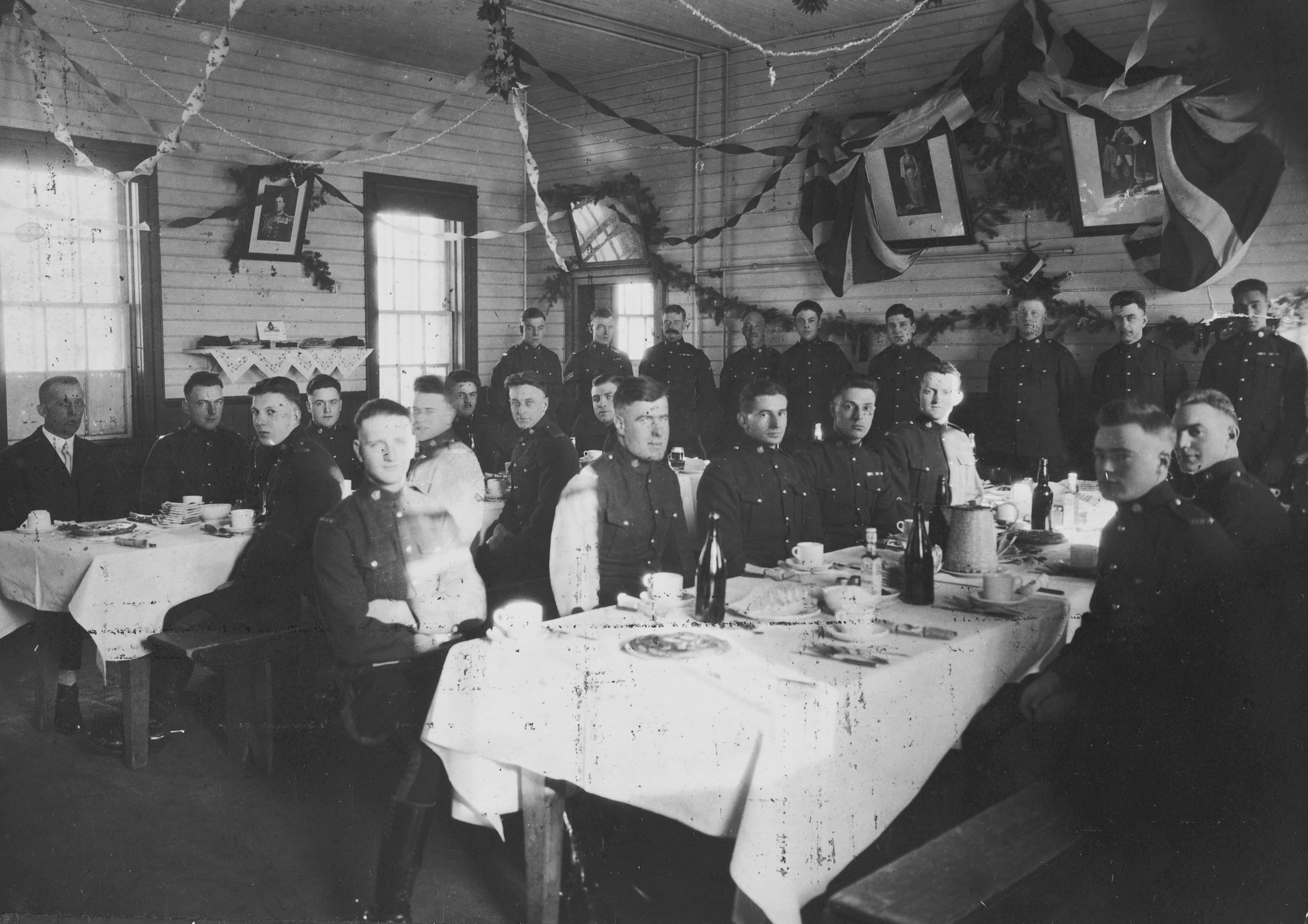 A17190